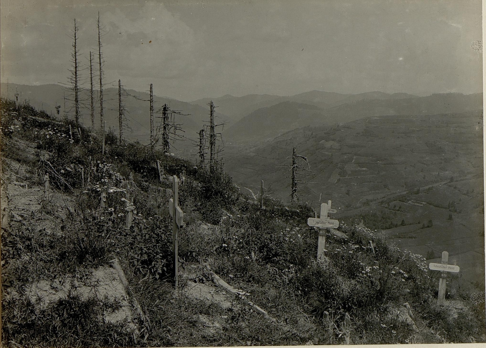 Gräber am Abhange des Zwinin